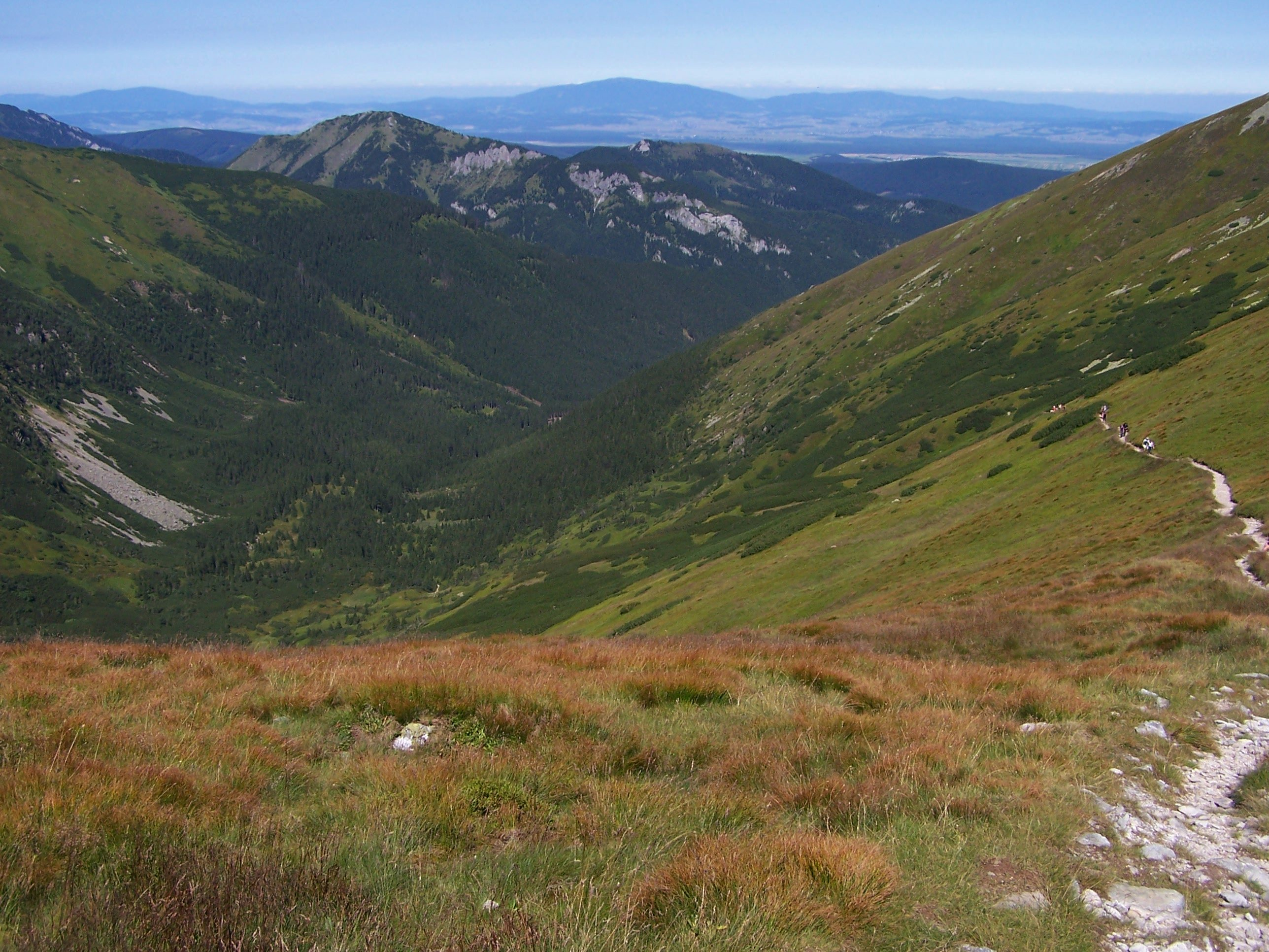 Dolina Starorobociańska(Tatra Mountains)